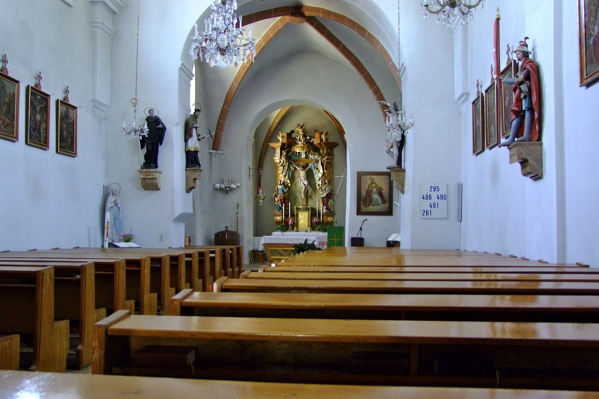 Kath. Pfarrkirche, hl. Nikolaus